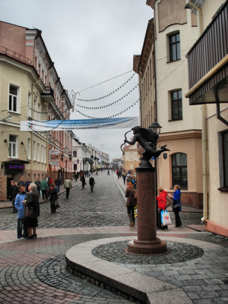 Беларуская (тарашкевіца): Забудова вул. Савецкай. г. Горадня This is a photo of Belarusian heritage monument. Reference number: 412Е000665 ( WLM)